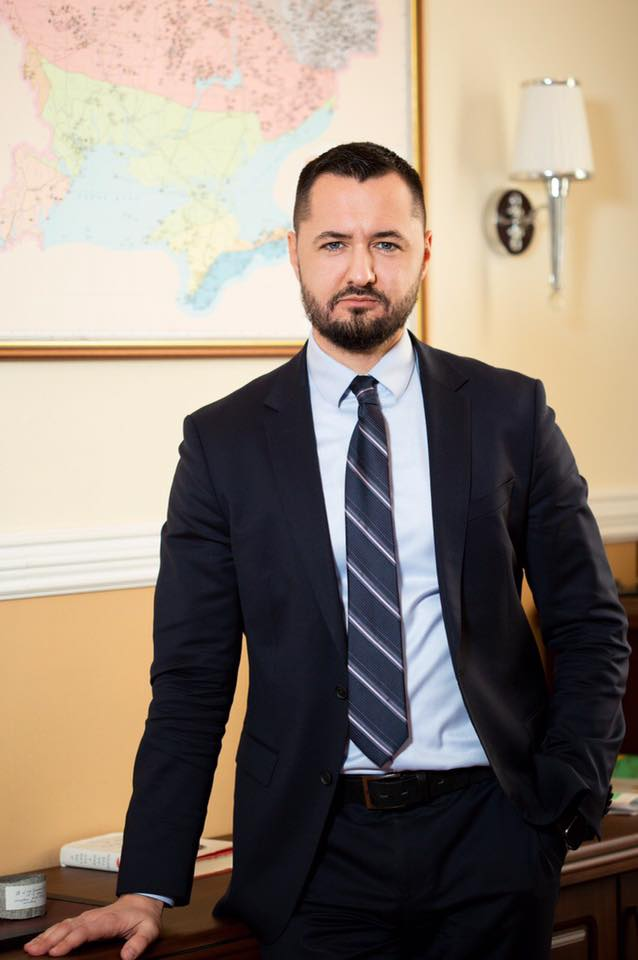 Фотографія Романа Опімаха зроблена у Державній Службі Геології та надр України